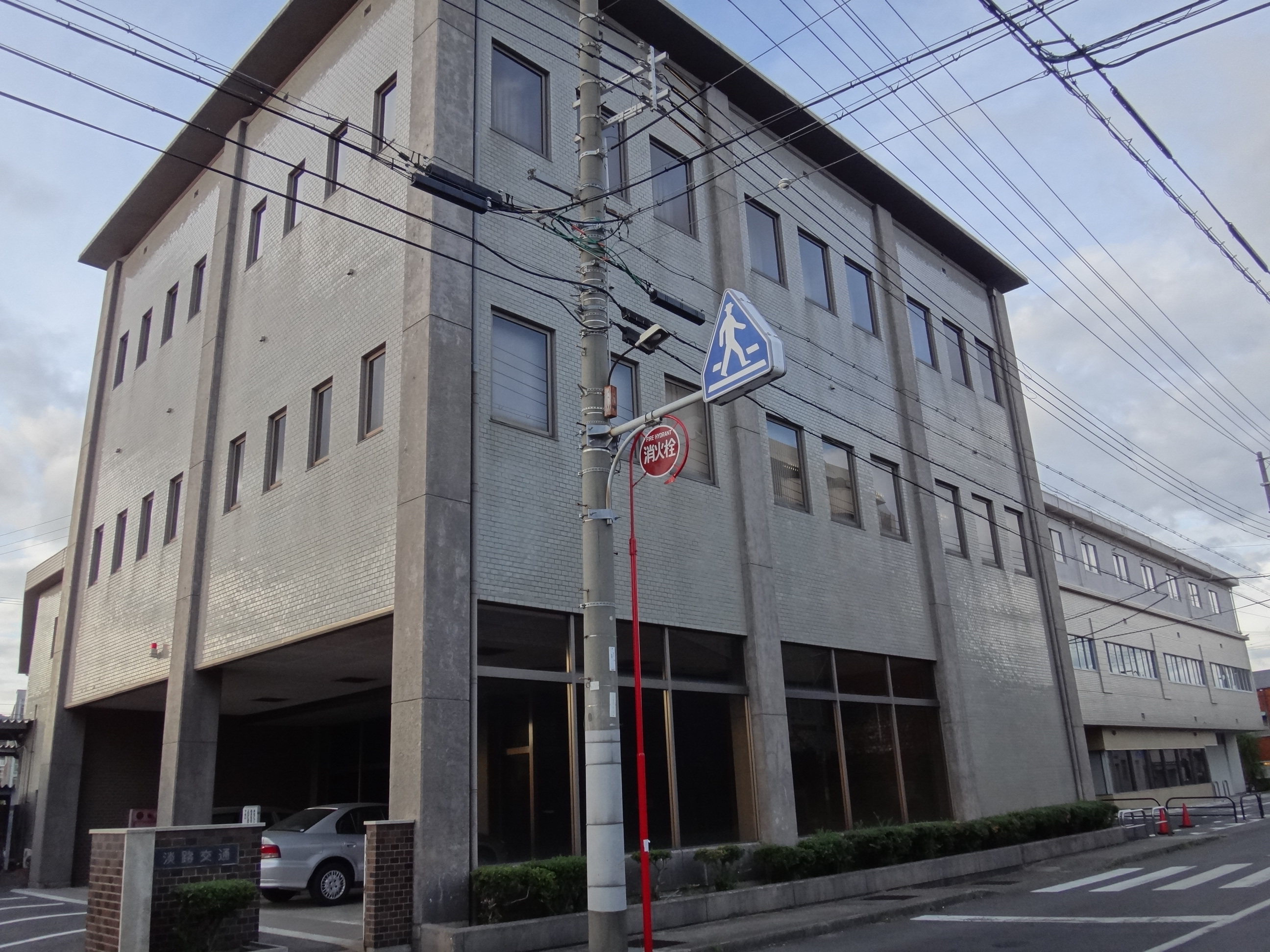 兵庫県洲本市の淡路交通・本社社屋（もと洲本駅）